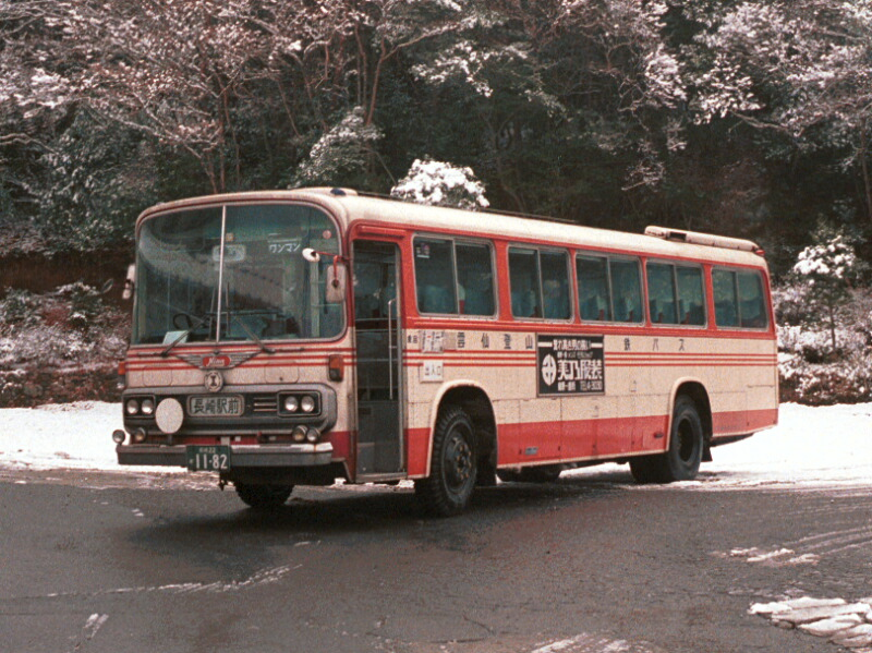 撮影時期・場所不明